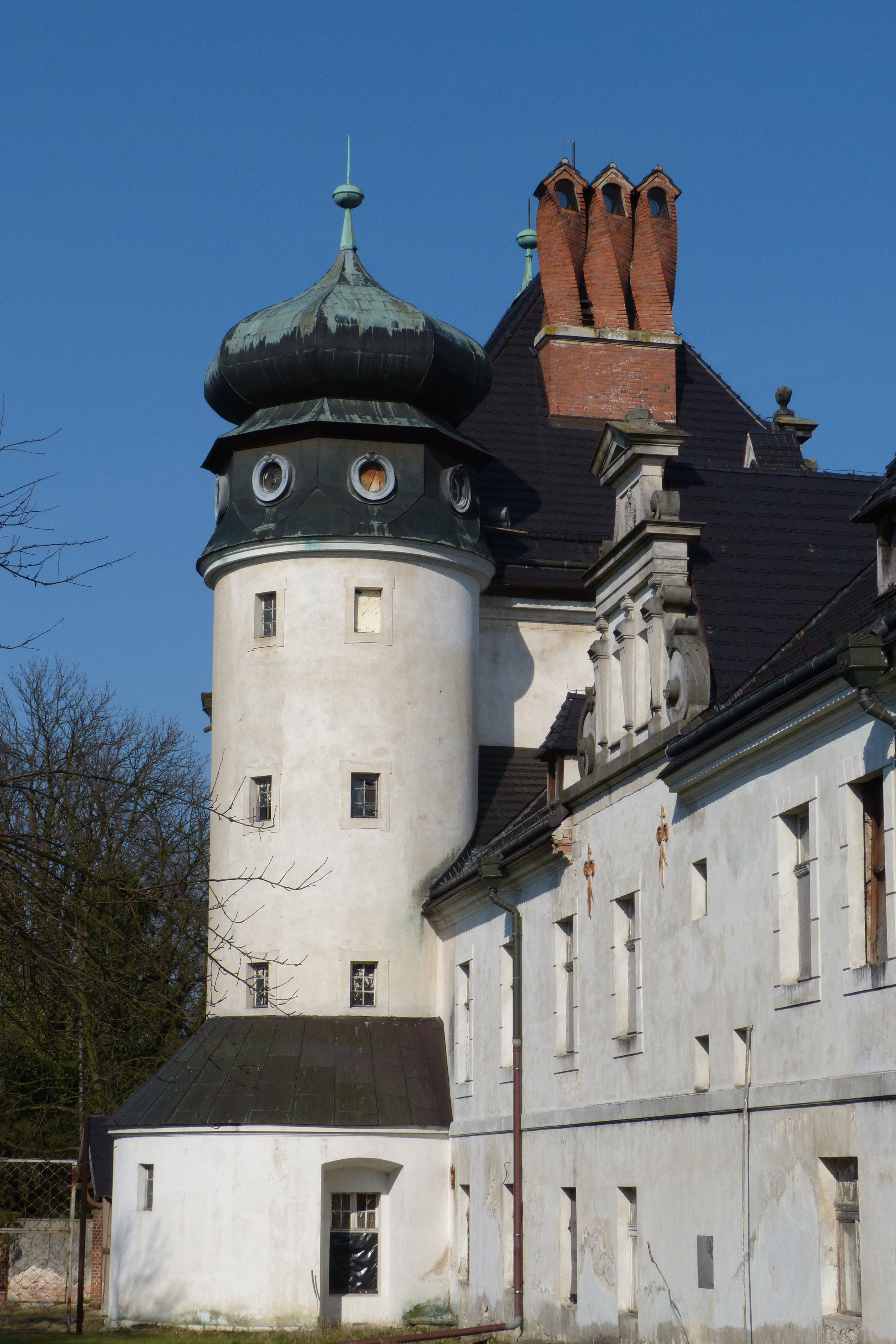 Zachodnia wieża zamku w Dąbrowie Niemodlińskiej.